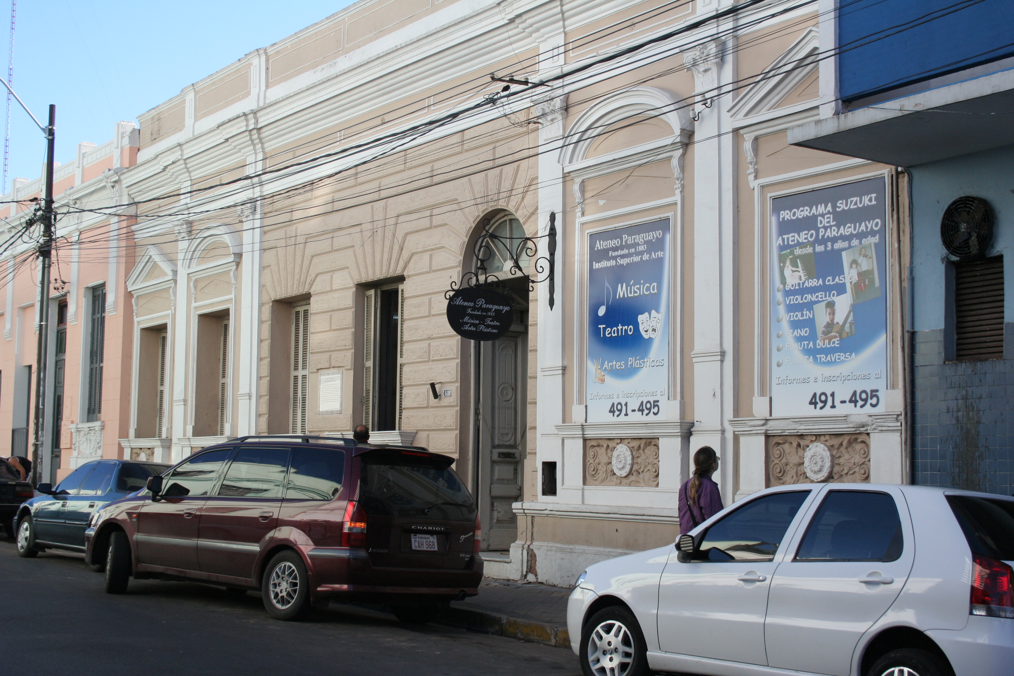 Casa Vierci Machaín, sede del Ateneo Paraguayo en Asunción.